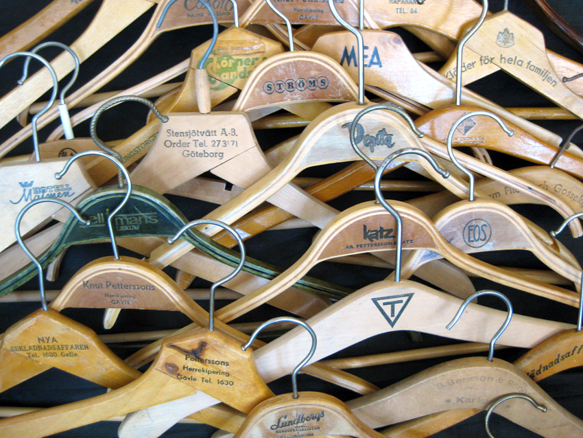 En del av en samling galjar.